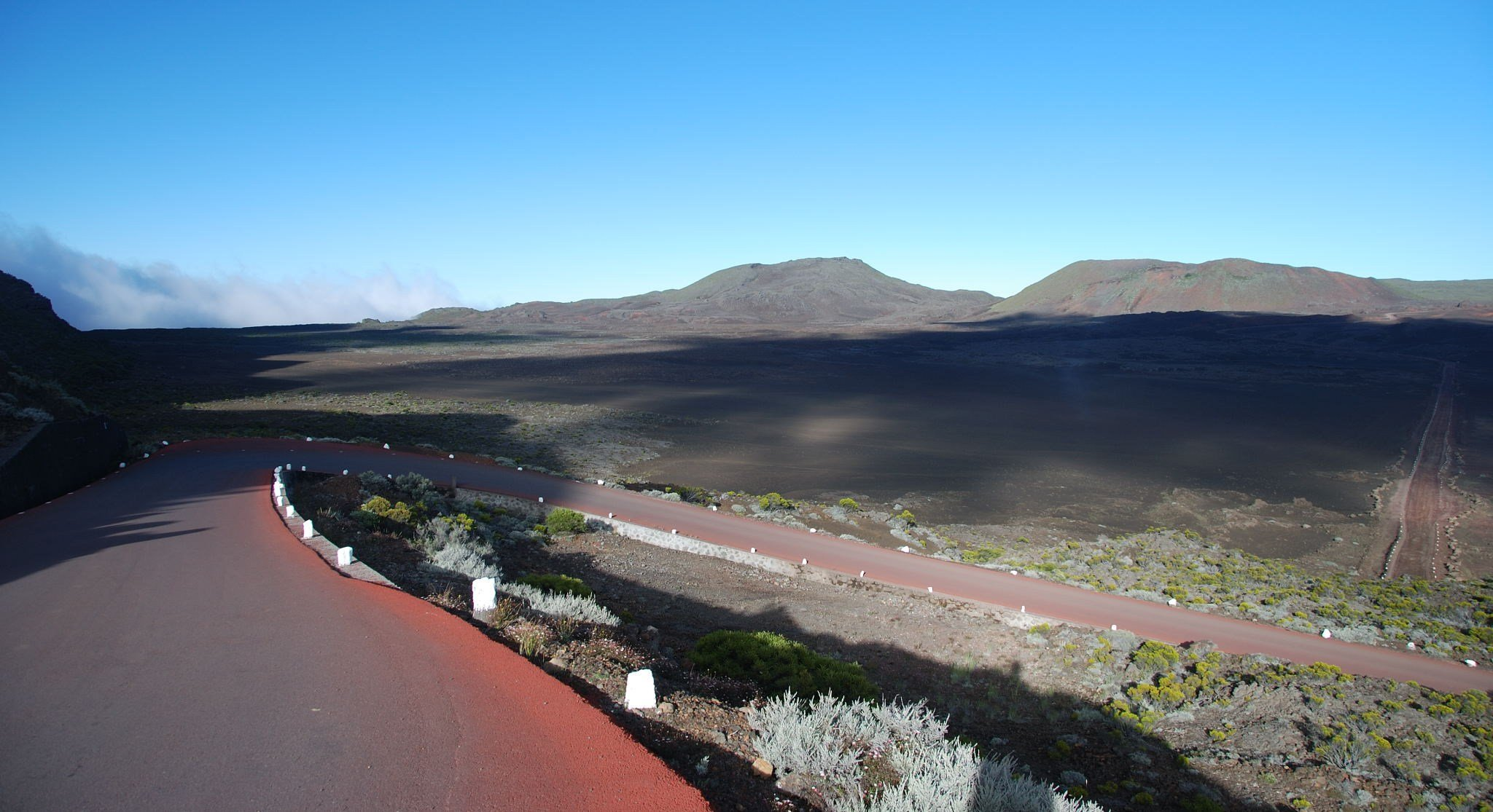 Les lacets de la route forestière du Volcan au Pas des Sables, sur l'île de La Réunion.